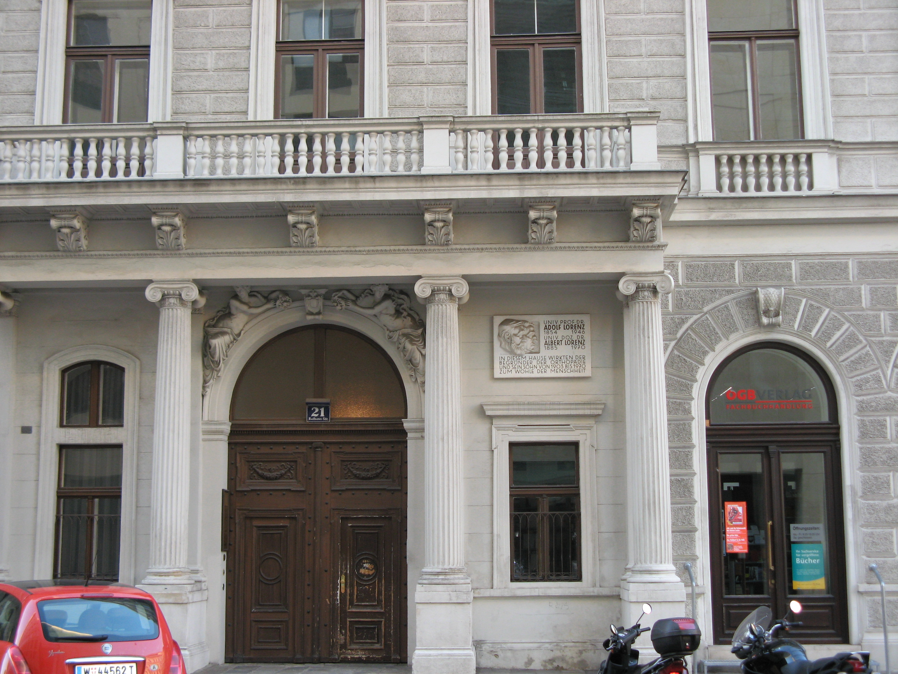 Haus Rathausstraße 21 (1880-81) von Anton Adametz, Wien-Innere Stadt